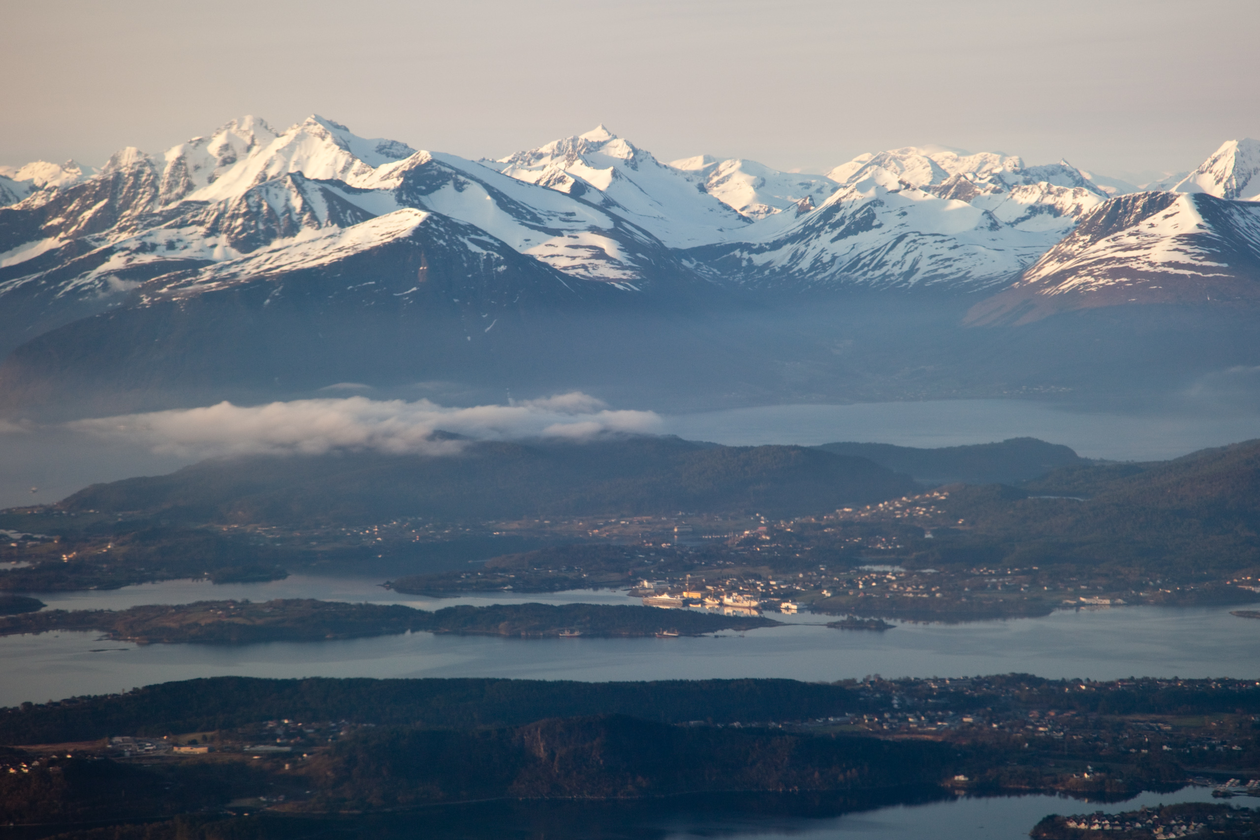 Ålesund sett frå fly